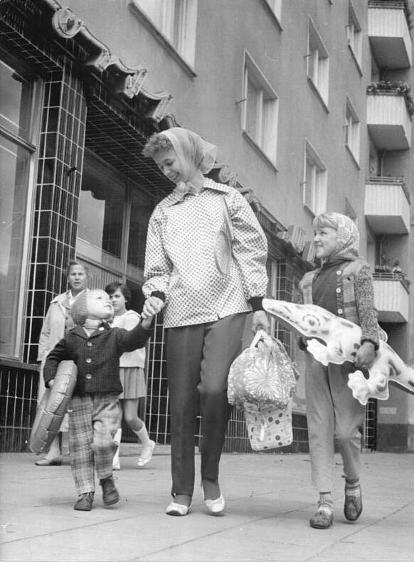 Berlin, Passanten Zentralbild Kohls Ko-Kt 8.5.1962 Berlin: "Gut eingekauft im Sporthaus Olympia" ...in der Schönhauser Allee hat Frau Heidelore Jahn mit Sohn Michael und Nichte Regina für den bevorstehenden Urlaub in Bad Kühlängsborn. Auch wer seinen Urlaub nicht an der See verbringt, findet in diesem Spezailgeschäft Campingartikel und Sportgeräte in reicher Auswahl.